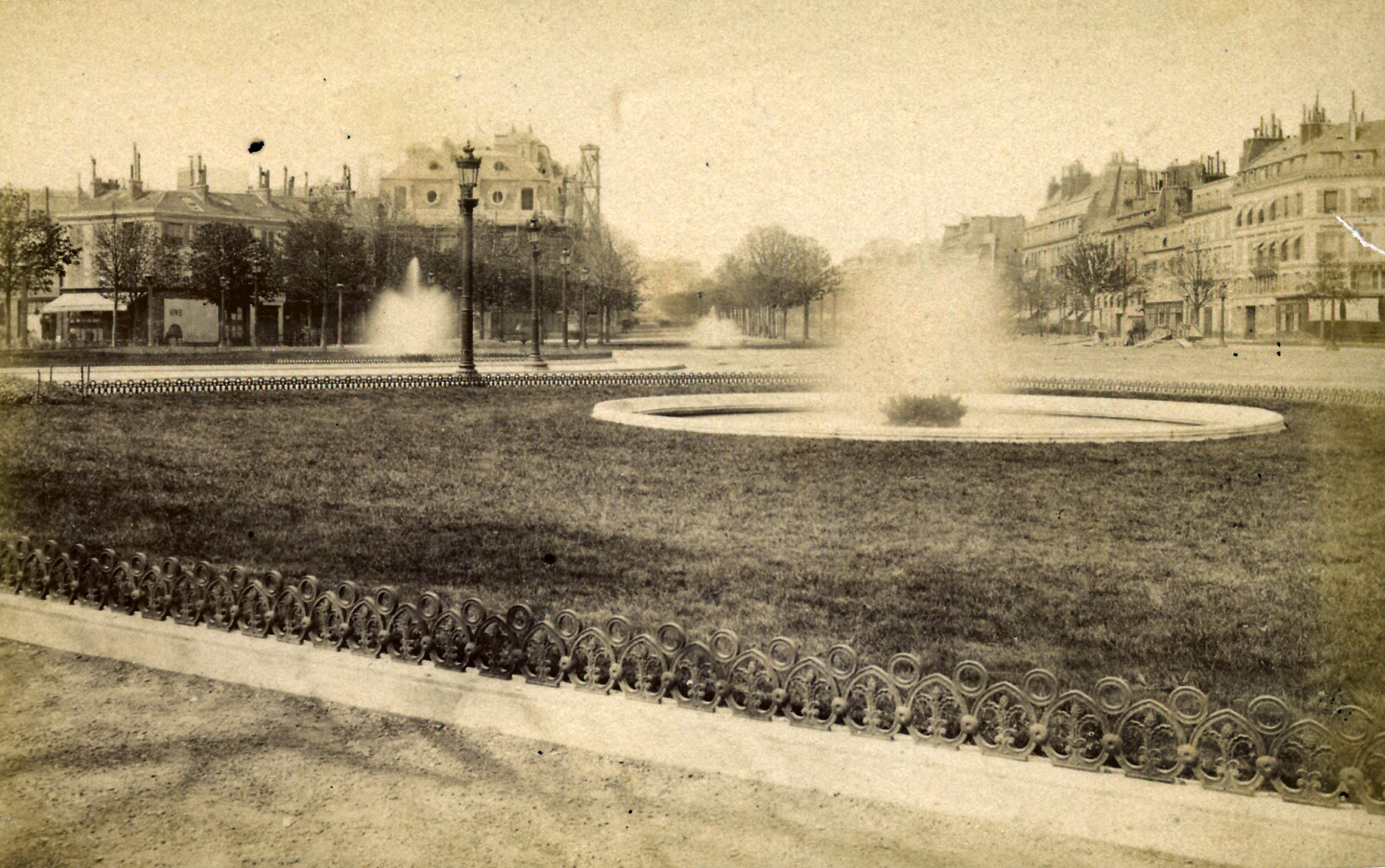 Une vue du Rond-Point et de la fontaine circa 1880